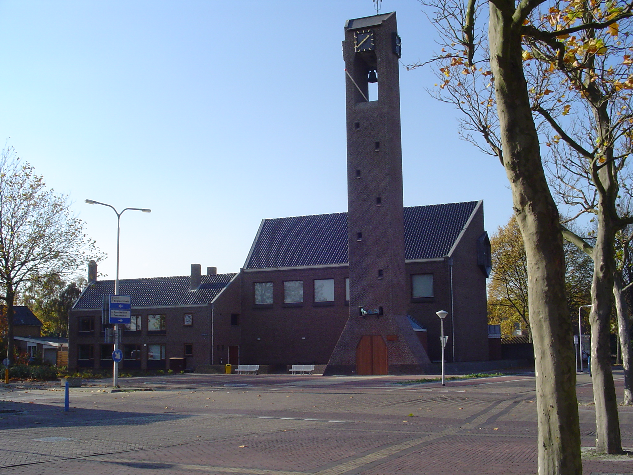 De protestantse kerk in Creil. Zelfgemaakt.